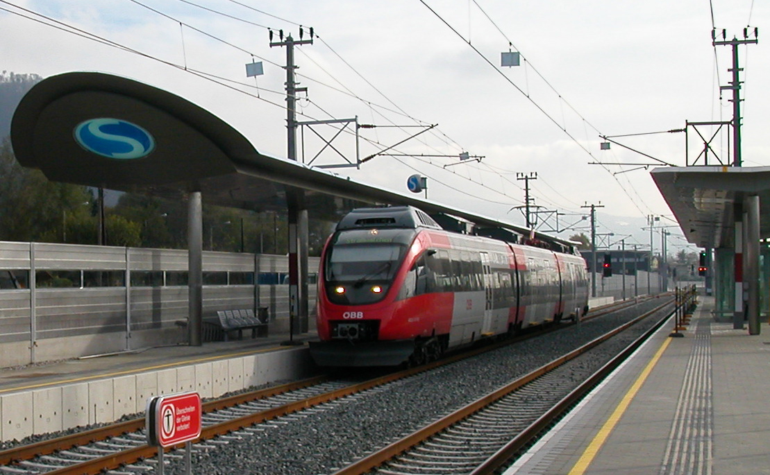 de: S-Bahn Station Salzburg Sam mit S-Bahn Garnitur 4023